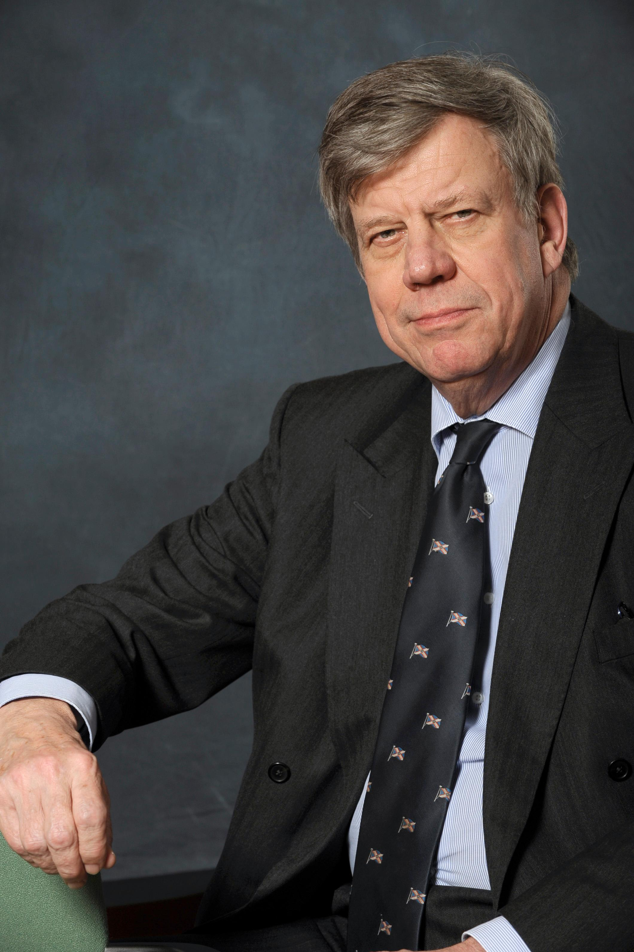 Minister van Veiligheid en Justitie Ivo Opstelten